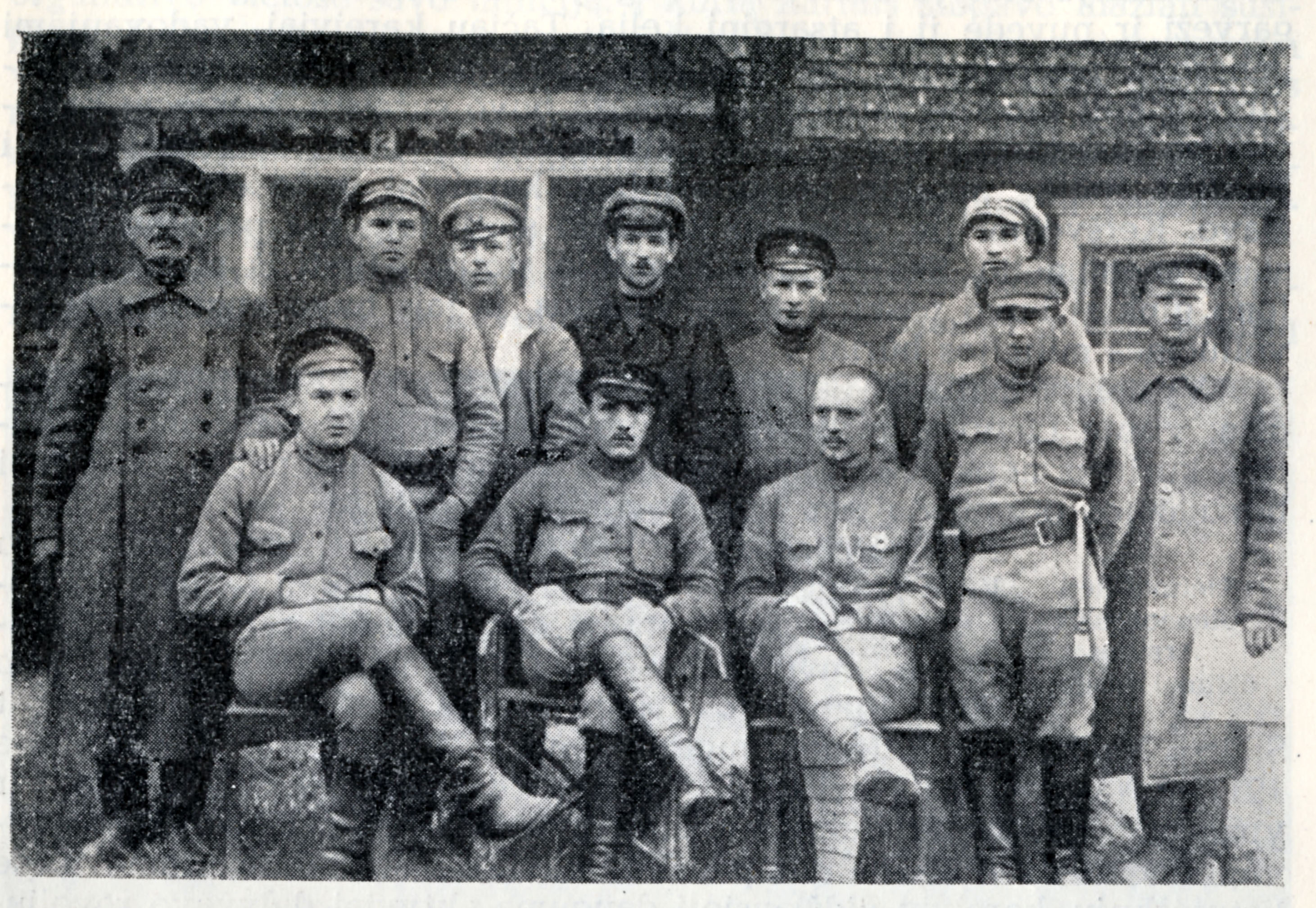 Bolševikų 7-ojo pulko, dalyvavusio Jiezno kautynėse, kariai.